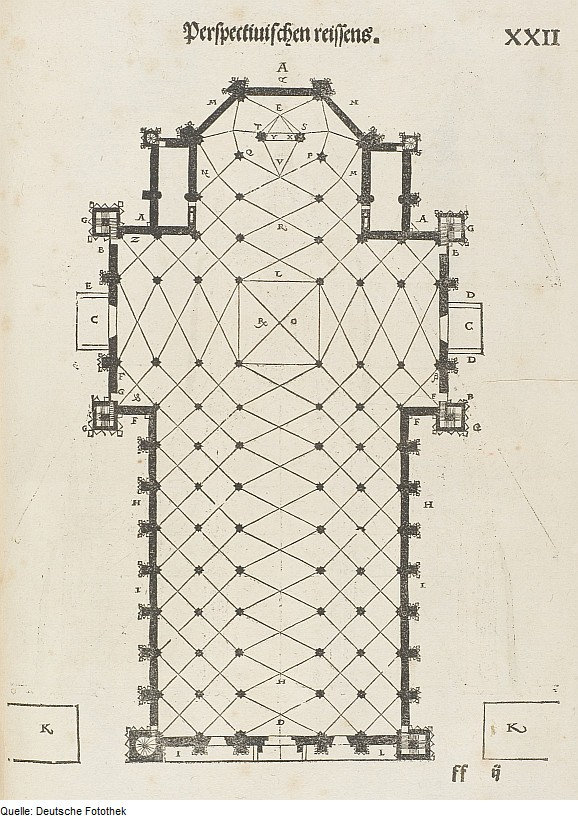 Original image description from the Deutsche FotothekArchitektur & Geometrie & Grundriss & Mailänder Dom